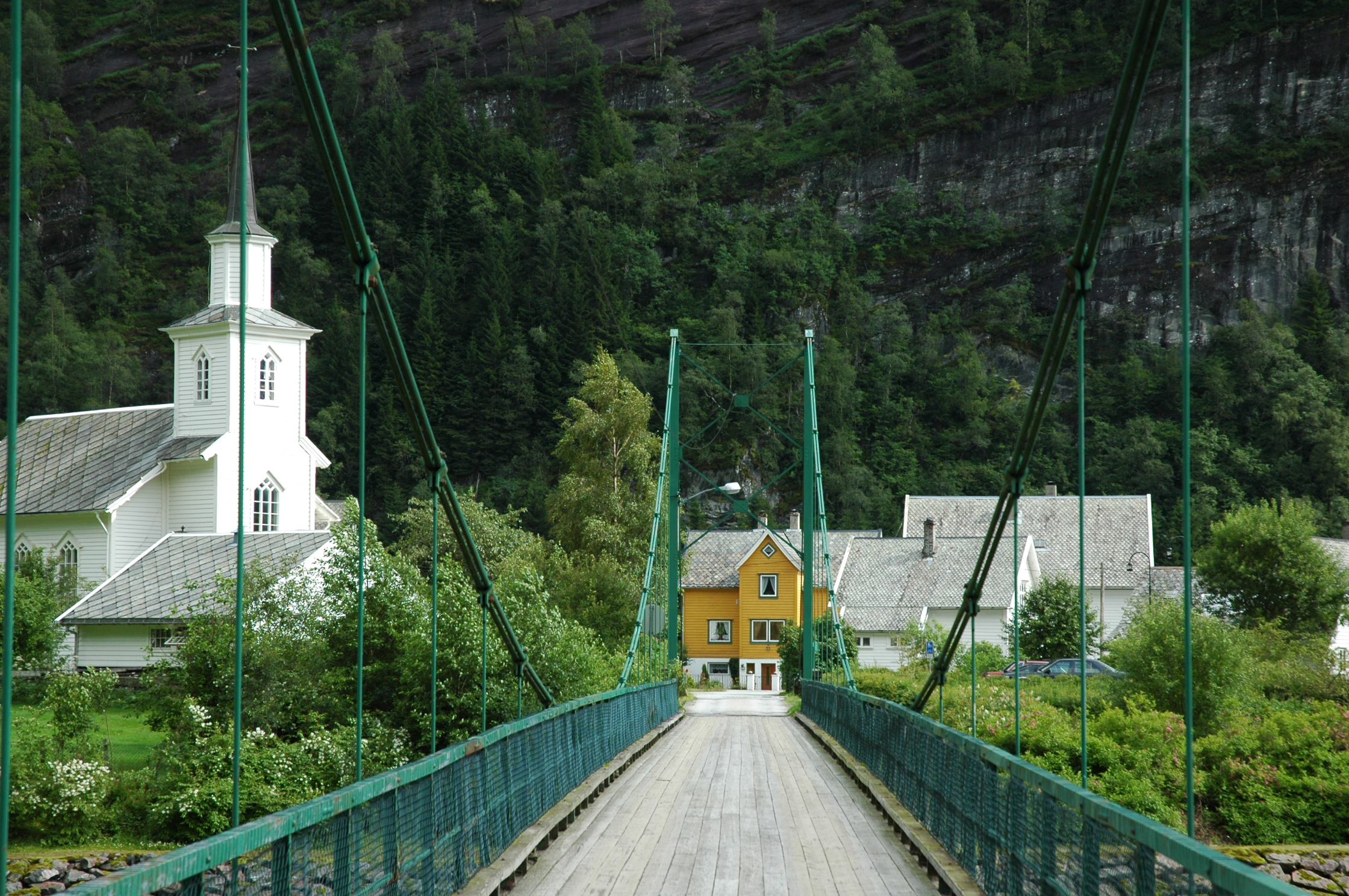 Mo kirke i Modalen, Hordaland.